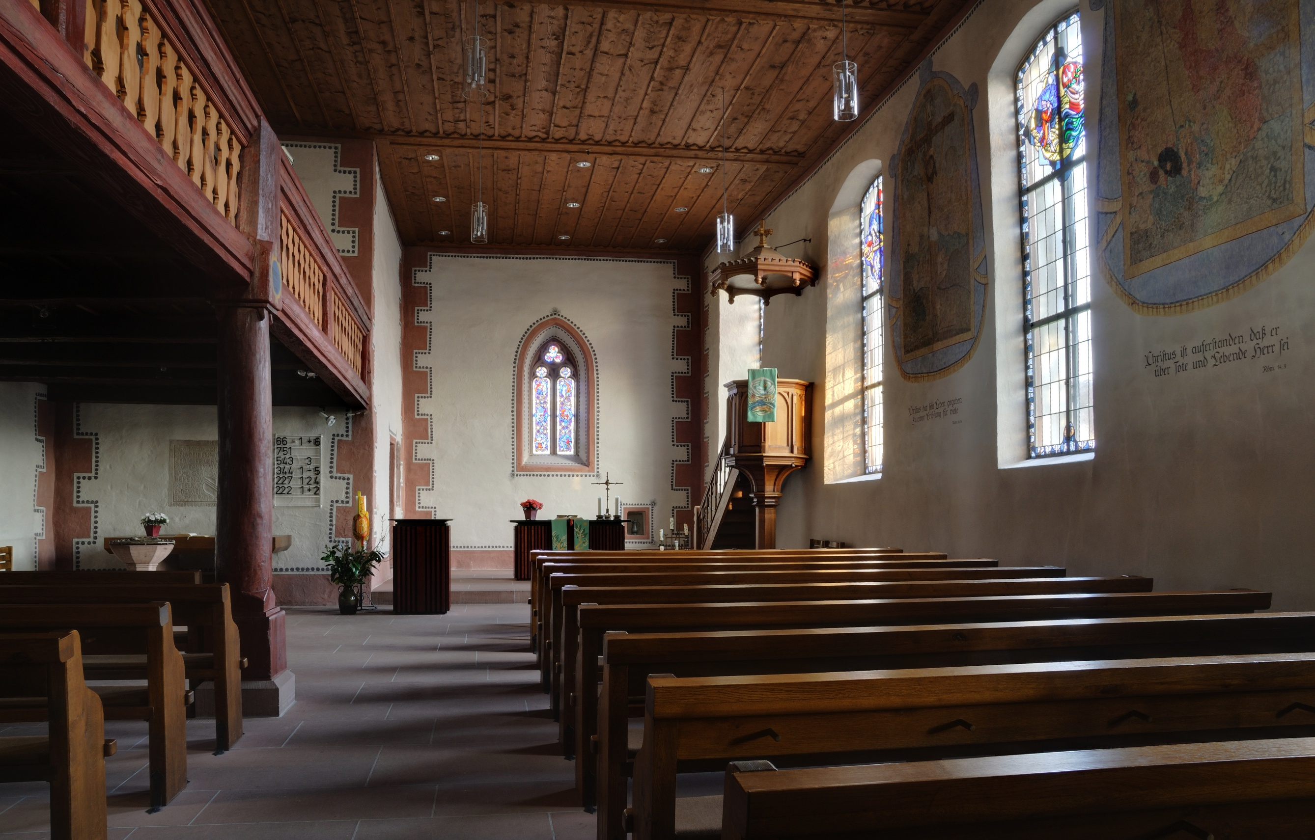 Kandern-Wollbach: Evangelische Kirche, Blick zum Altar